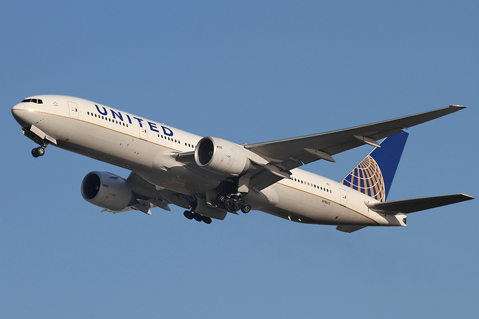 EGLL